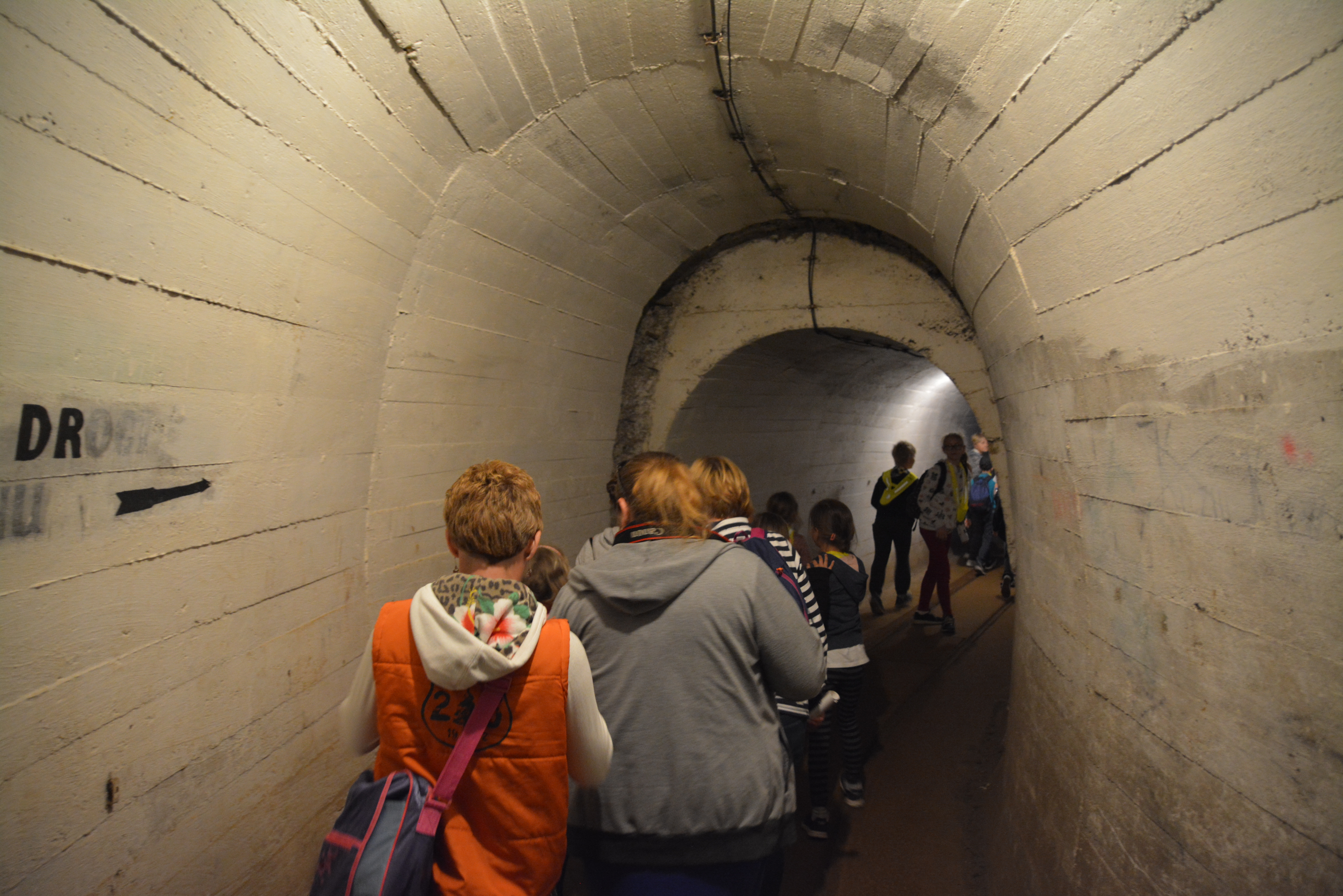 MRU - Muzeum Fortyfikacji i Nietoperzy w Pniewie